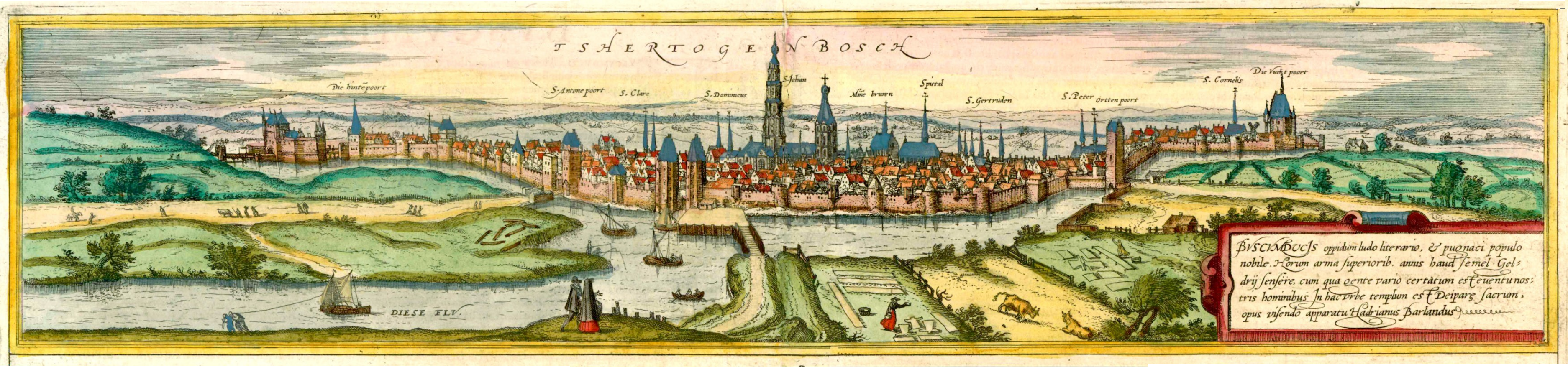 Panorama of Hertogenbosch between 1575 and 1584